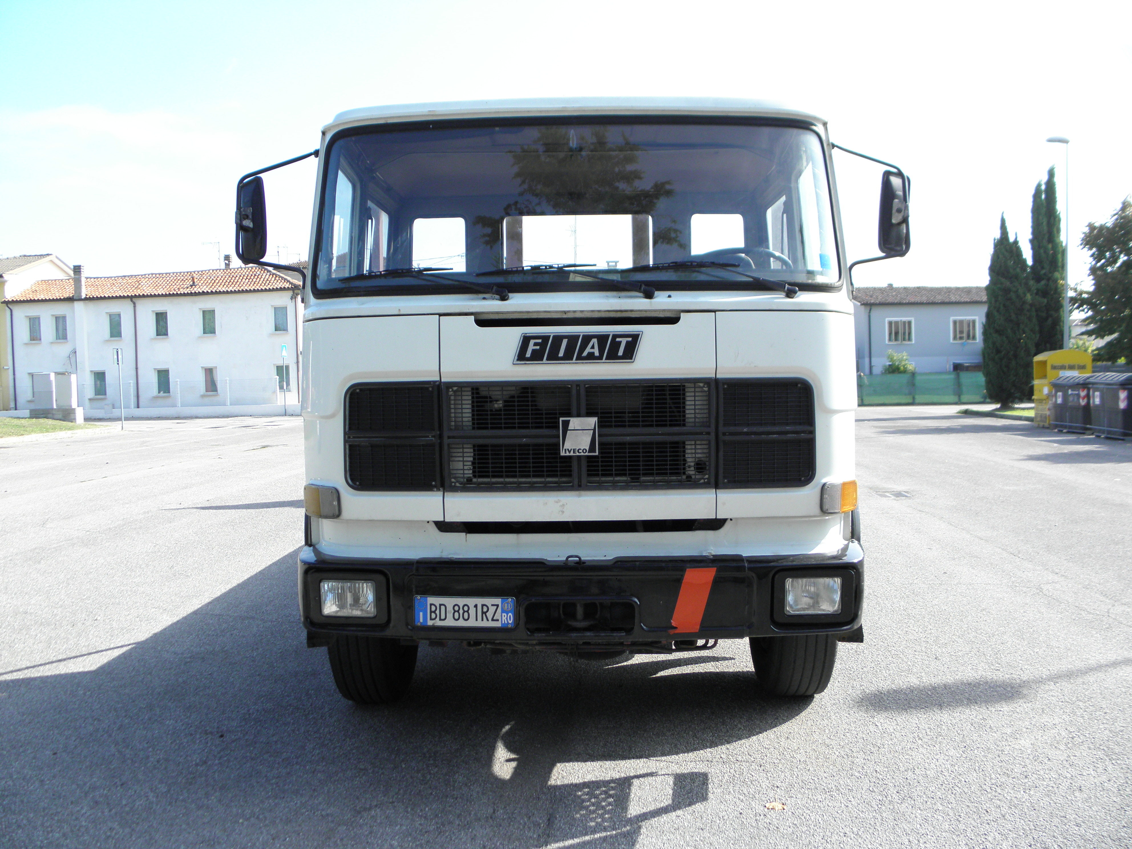 Fiat-Iveco 160 F 26 fotografato a a Boara Polesine, Rovigo.